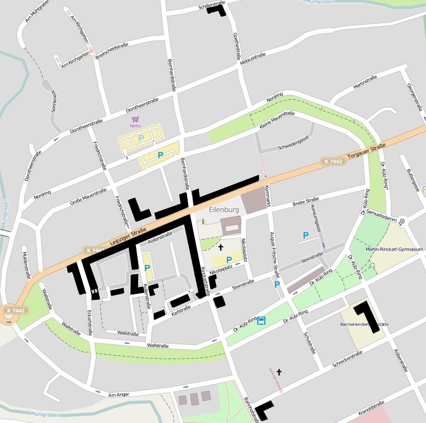 Karte der Innenstsadt von Eilenburg mit den Standorten markanter Architektur der 1950er Jahre.